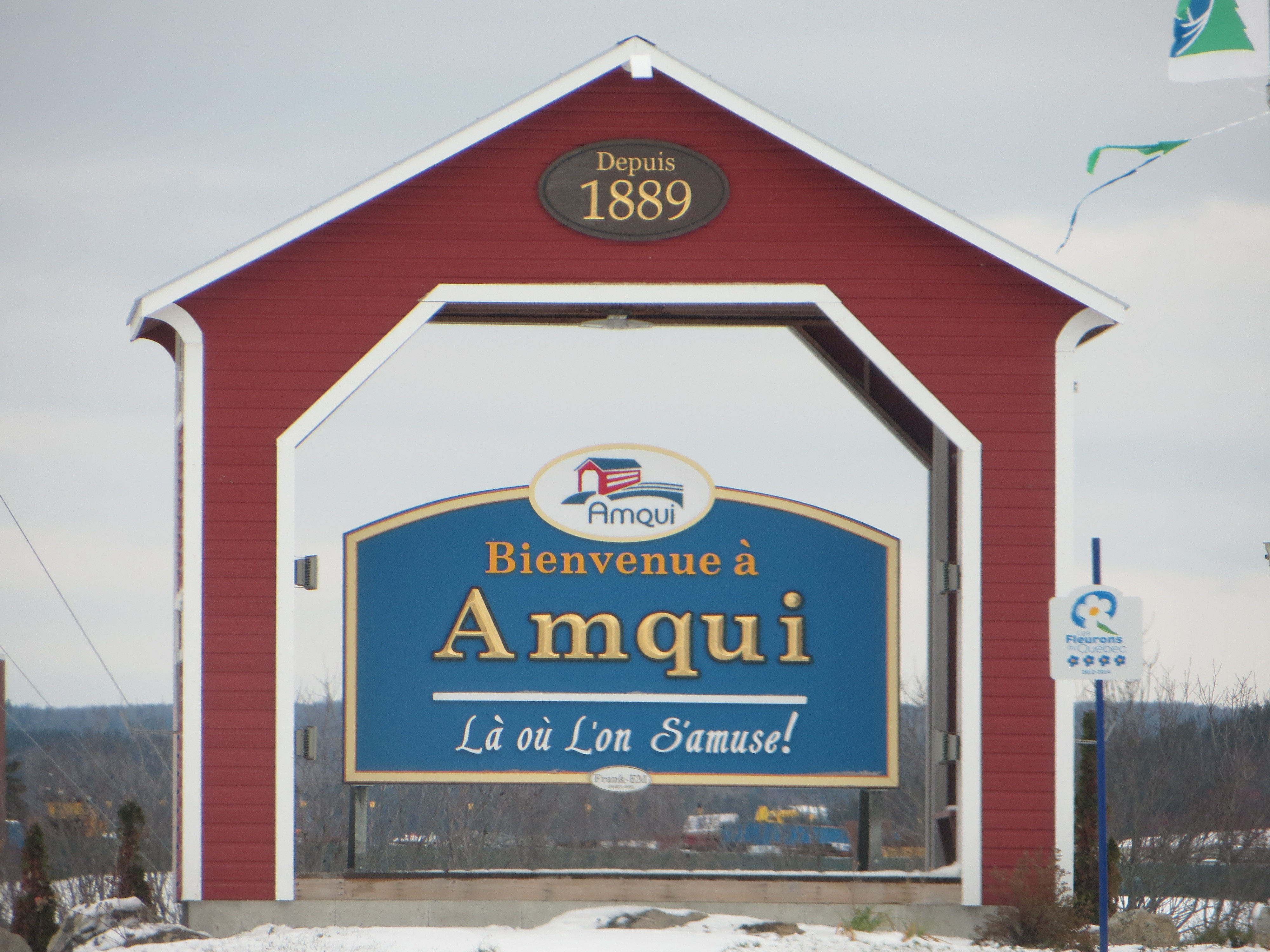 Aviso de bienvenida de Amqui.